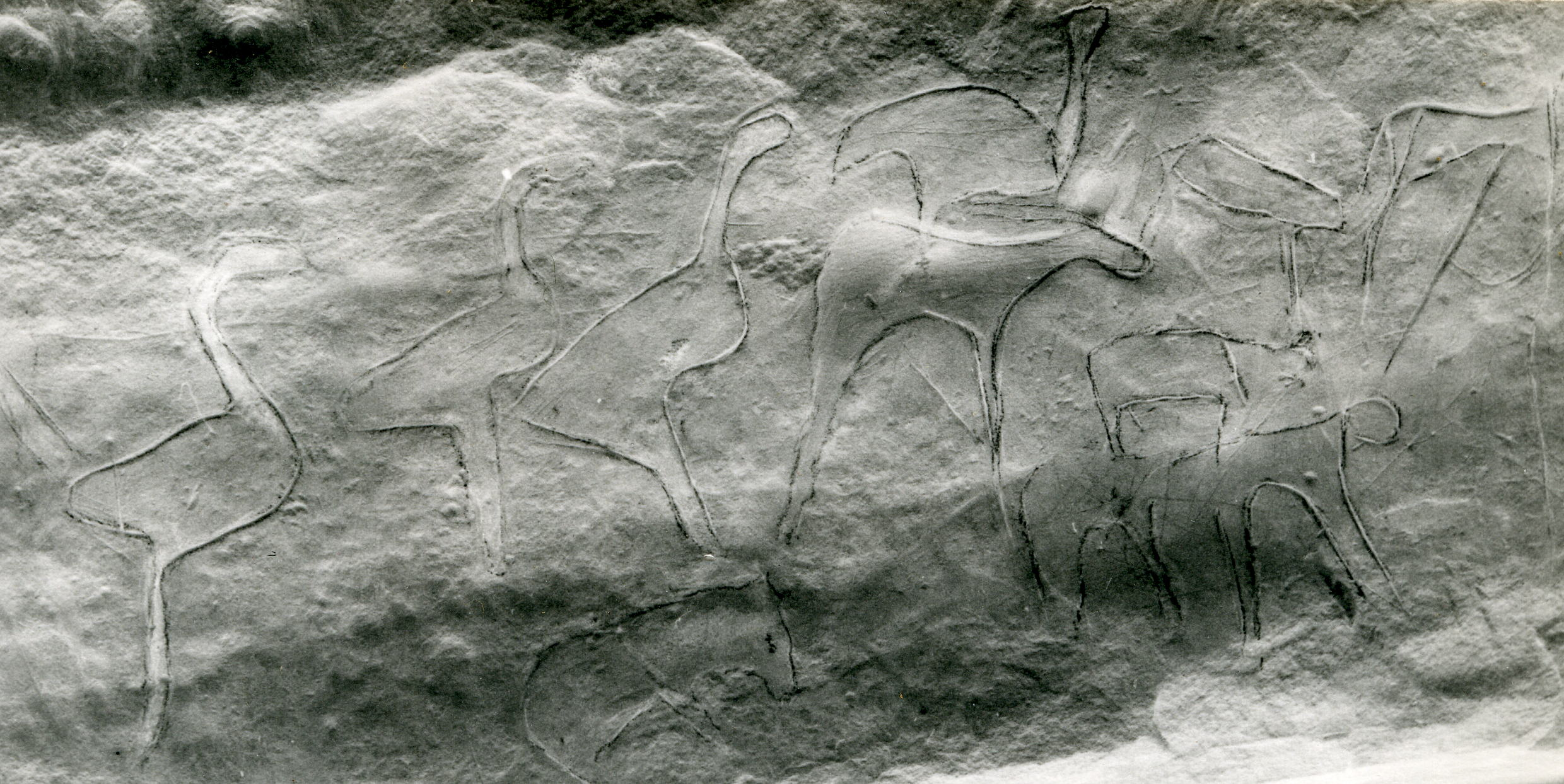 gravure préhistorique du Sud-oranais (Algérie)